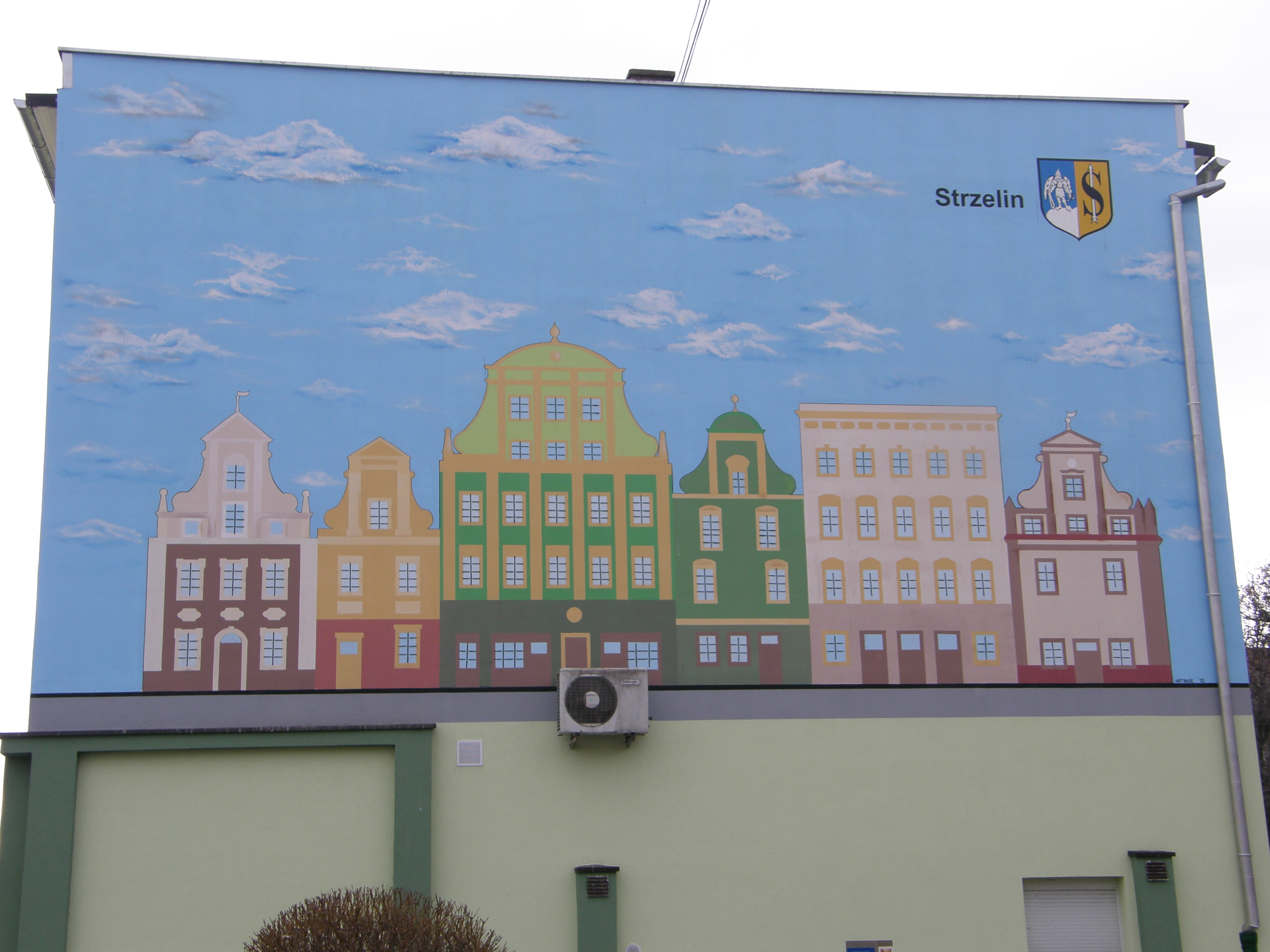 Jeden z budynków przy ul. T. Kościuszki.